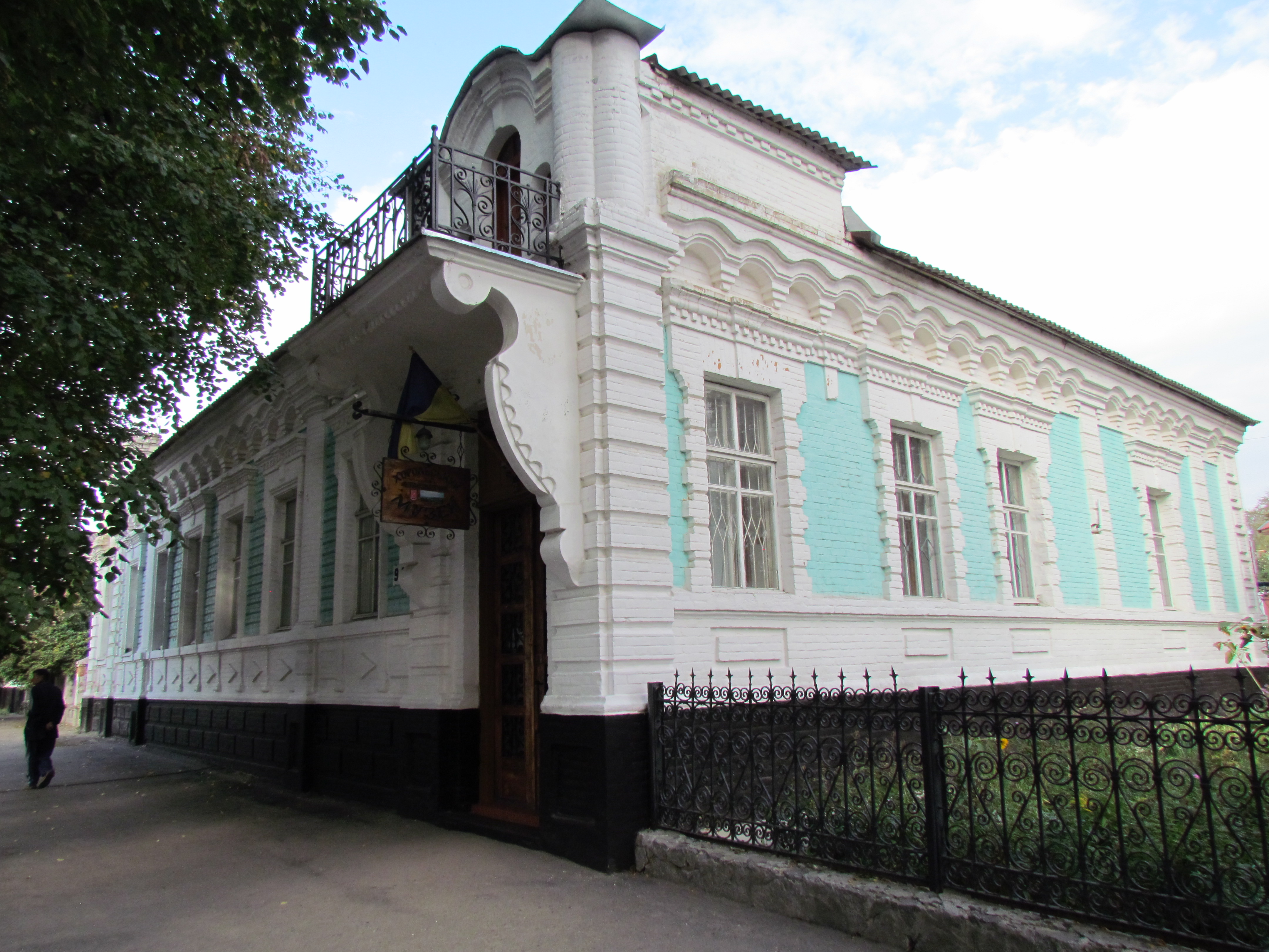 Хорольський краєзнавчий музей